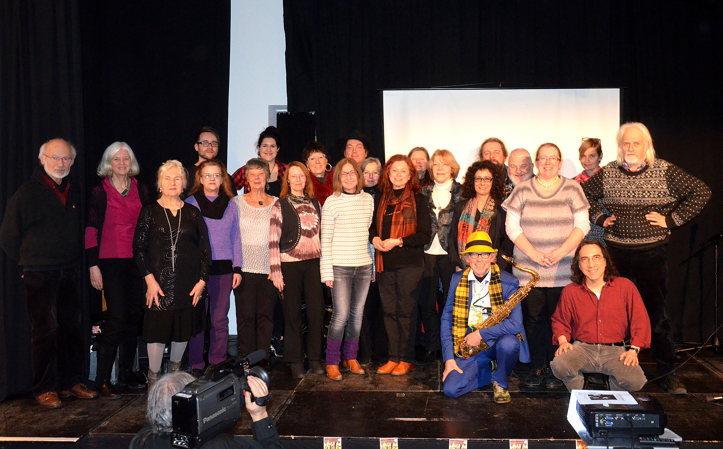 Posthum fanden sich rund 200 Freundinnen, Kollegen, MitstreiterInnen und WeggefährtInnen des 2016 verstorbenen Liedermachers und Chansonniers Wulf Hühn an dessen 74. Geburtstag zu einer Dankes- und Abschiedsfeier unter dem Titel „Alles Schöne“ im Stadtteilzentrum Nordstadt Bürgerschule zu einem rund 5 Stunden andauernden Programm zusammen, um auf der Bühne mit Musik, Tanz, Lesungen und anderen Darbietungen an den Künstler zu erinnern. Zum Abschluss des Abends posierten die noch anwesenden Vortragenden und Veranstalter vor laufenden Kameras gemeinsam zu einem Gruppenbild auf der Bühne ...